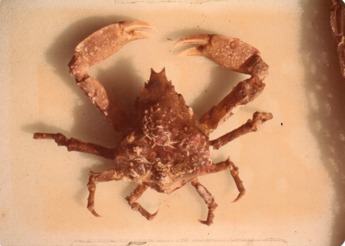 Encontrado a 350m al norte de Máncora, Perú